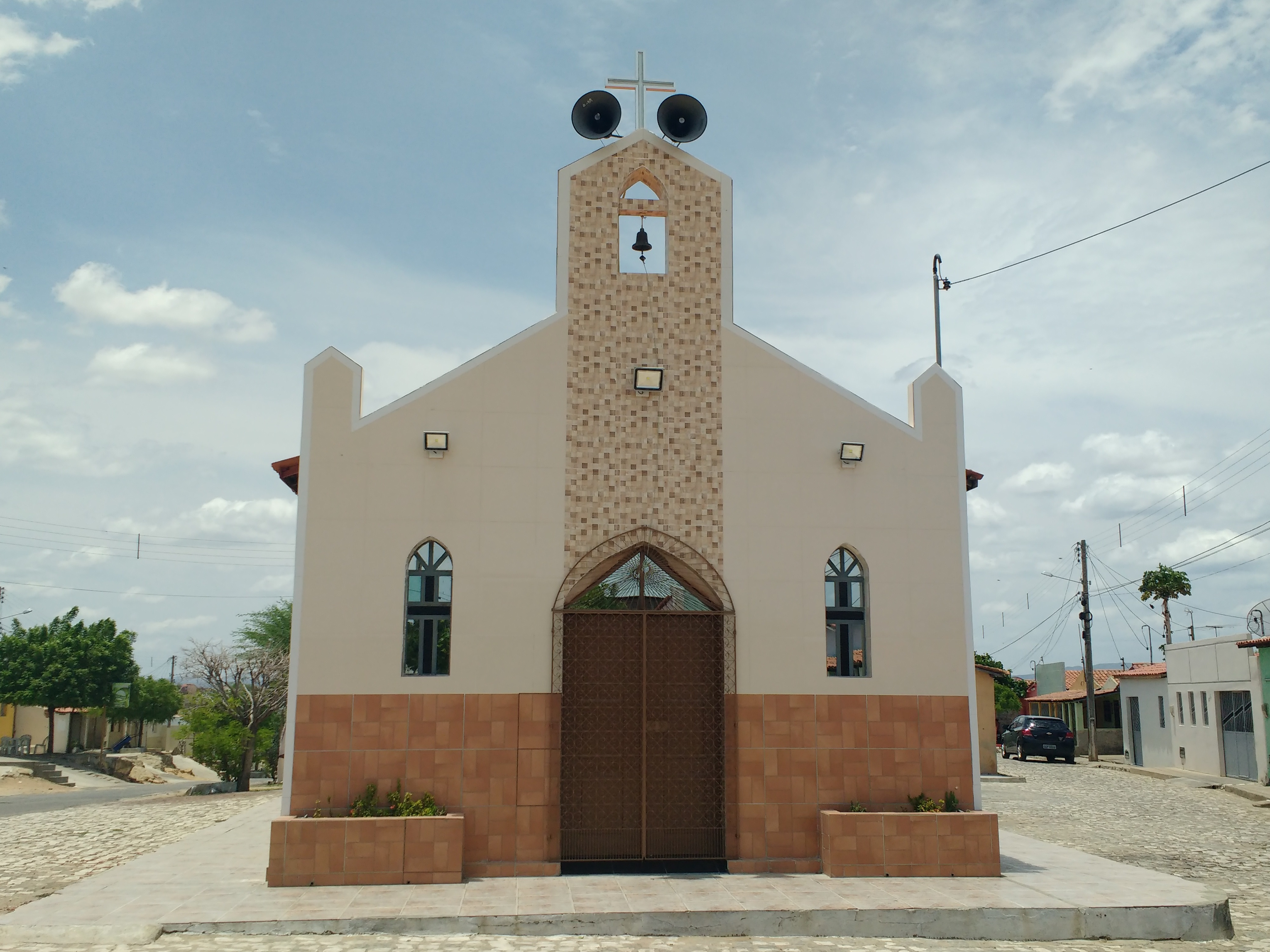 Capela de São Geraldo Magela, da paróquia de Nossa Senhora da Conceição, no bairro São Geraldo, em Pau dos Ferros, Rio Grande do Norte (Brasil).